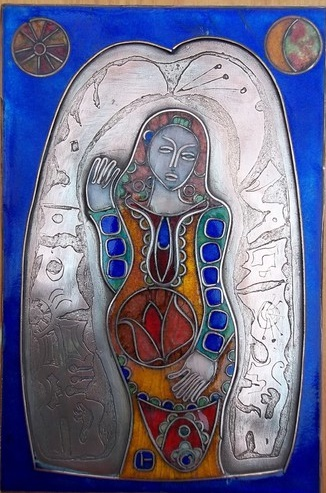 Turi Endre rekeszzománc képe